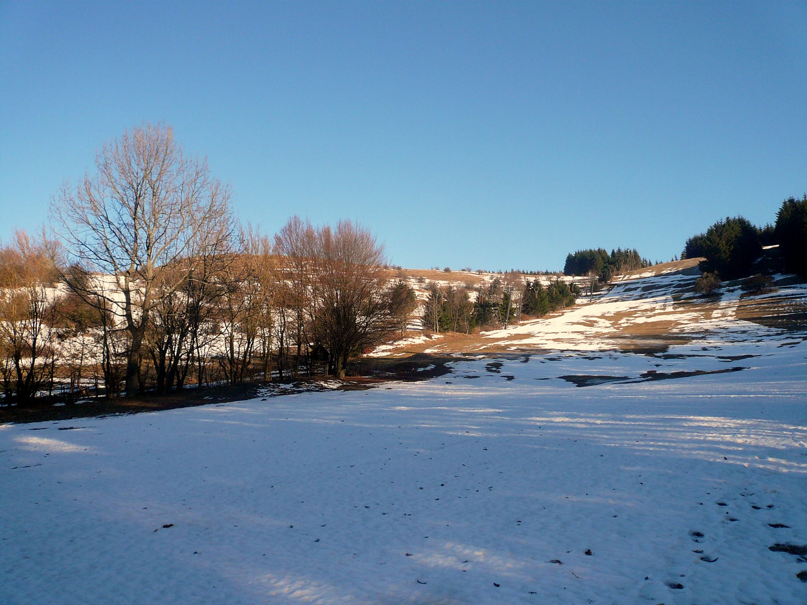 Skizentrum Simmelsberg